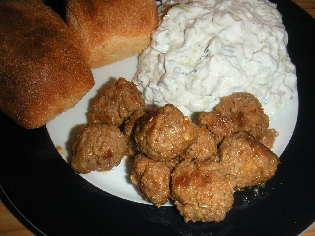 Frikadeller af kikærter og lammekød med brød og tzatziki